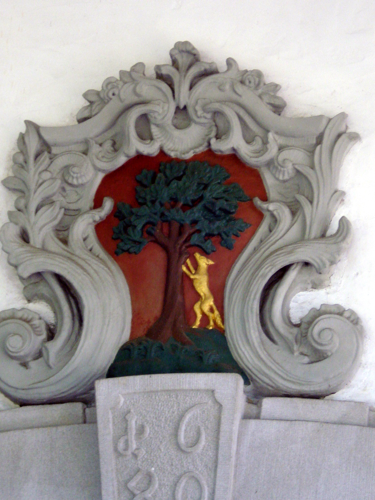 Das Rischer Wappen auf der Kirche Risch.